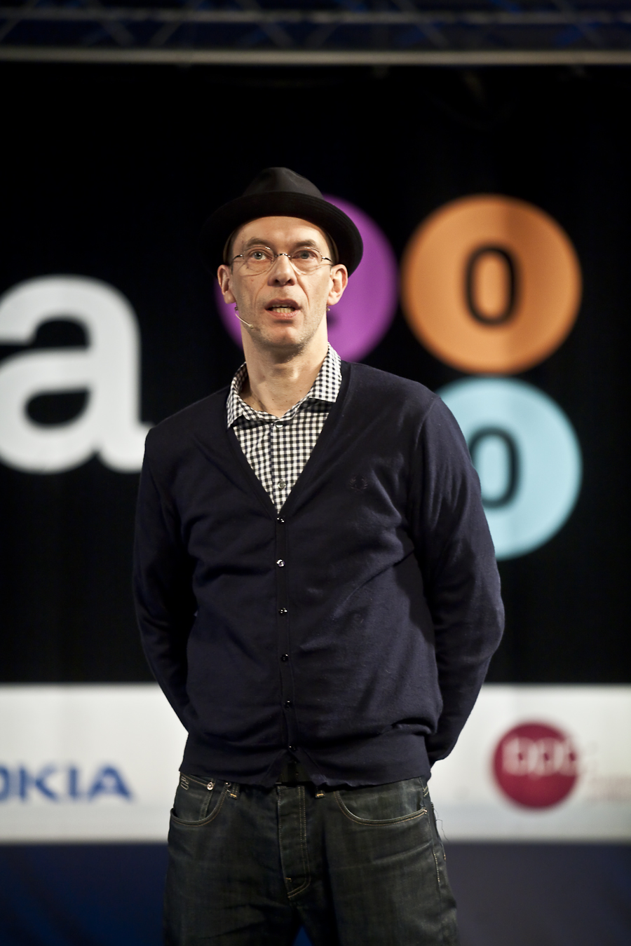 Johnny Haeusler auf der re:publica. Photo by Daniel Seiffert